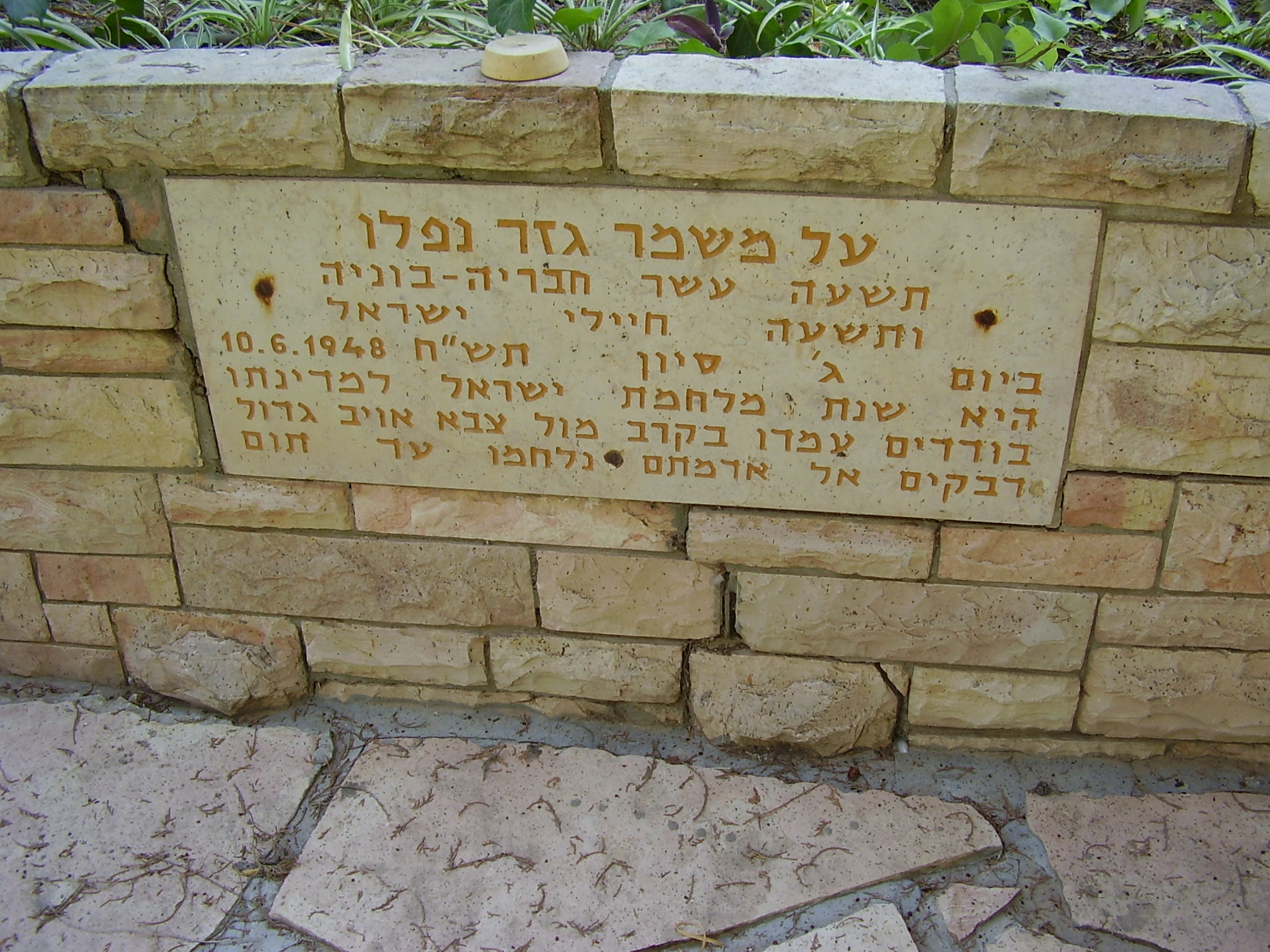 כתובת בקבר האחים לחללי קרב גזר במלחמת העצמאות, בבית העלמין בקיבוץ גזר